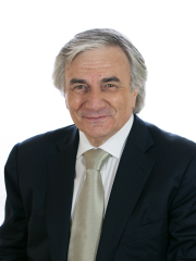 Claudio Zin